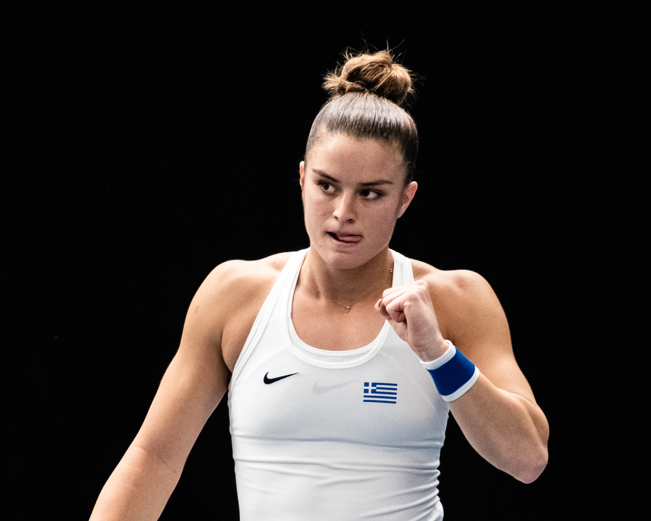 Maria Sakkari